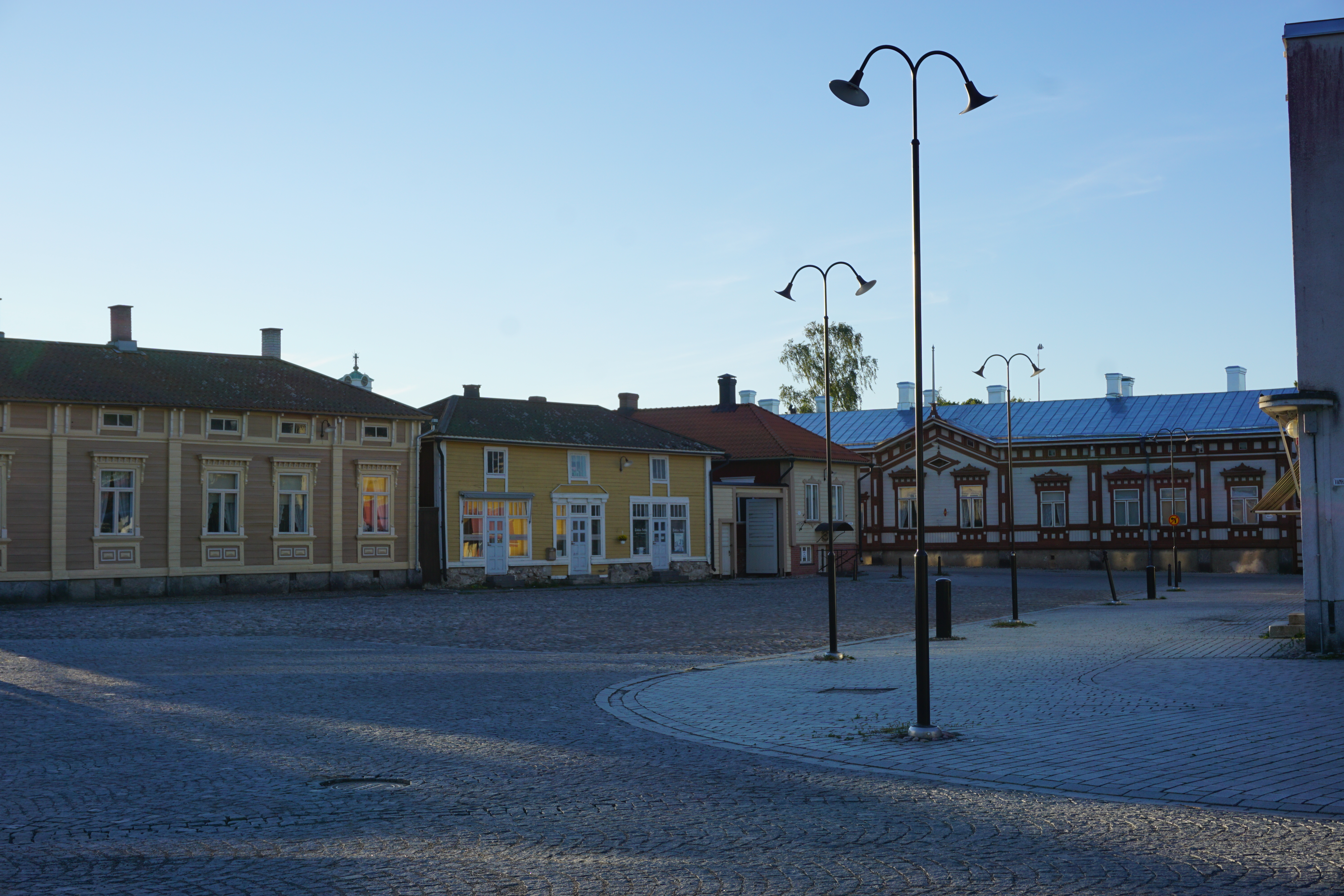 Kalatori